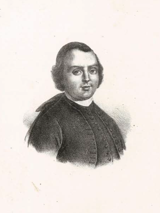 Dal Dizionario biografico degli uomini illustri di Sardegna di Pasquale Tola, 1837